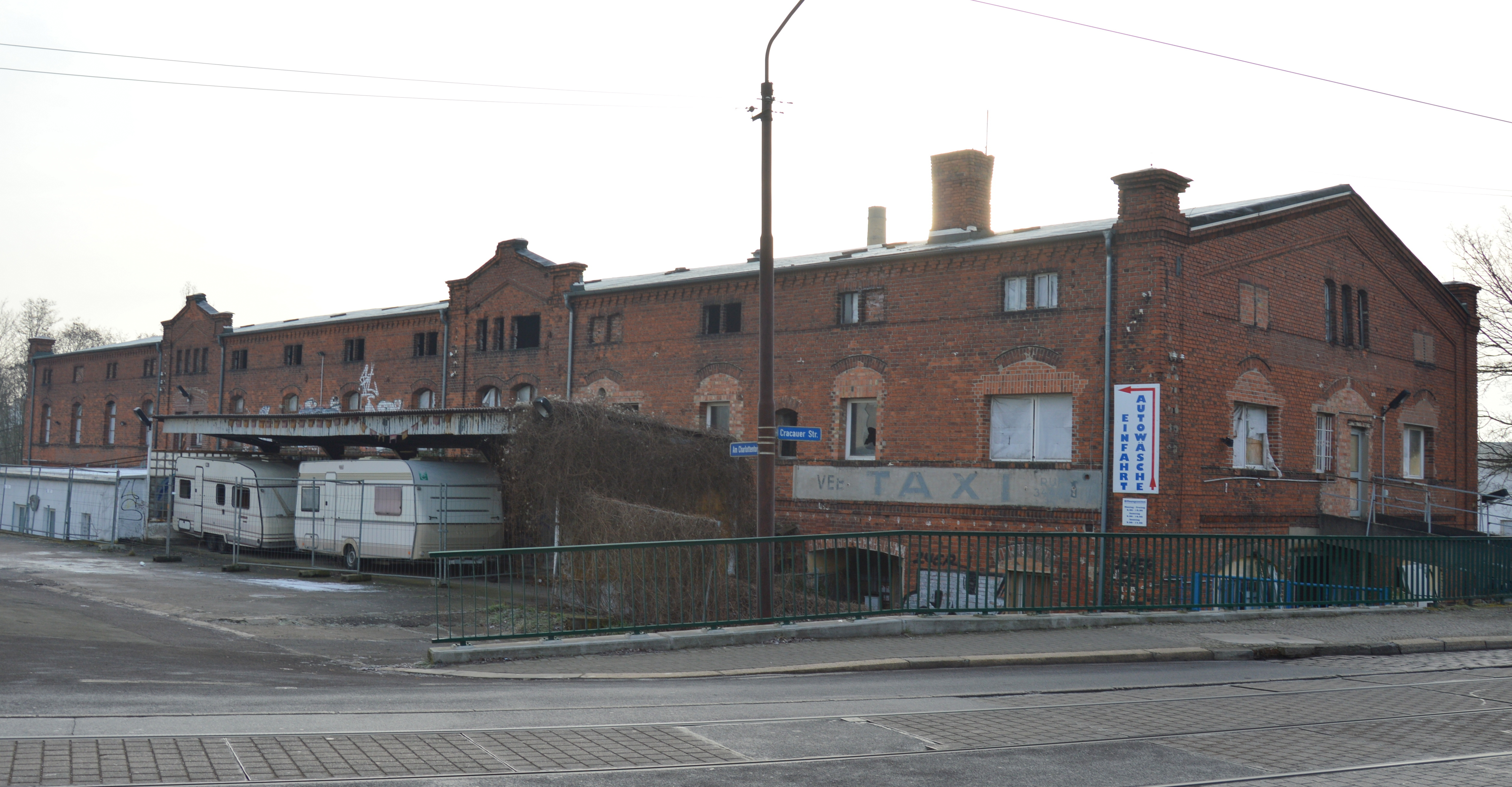 Turmschanzenstraße 2